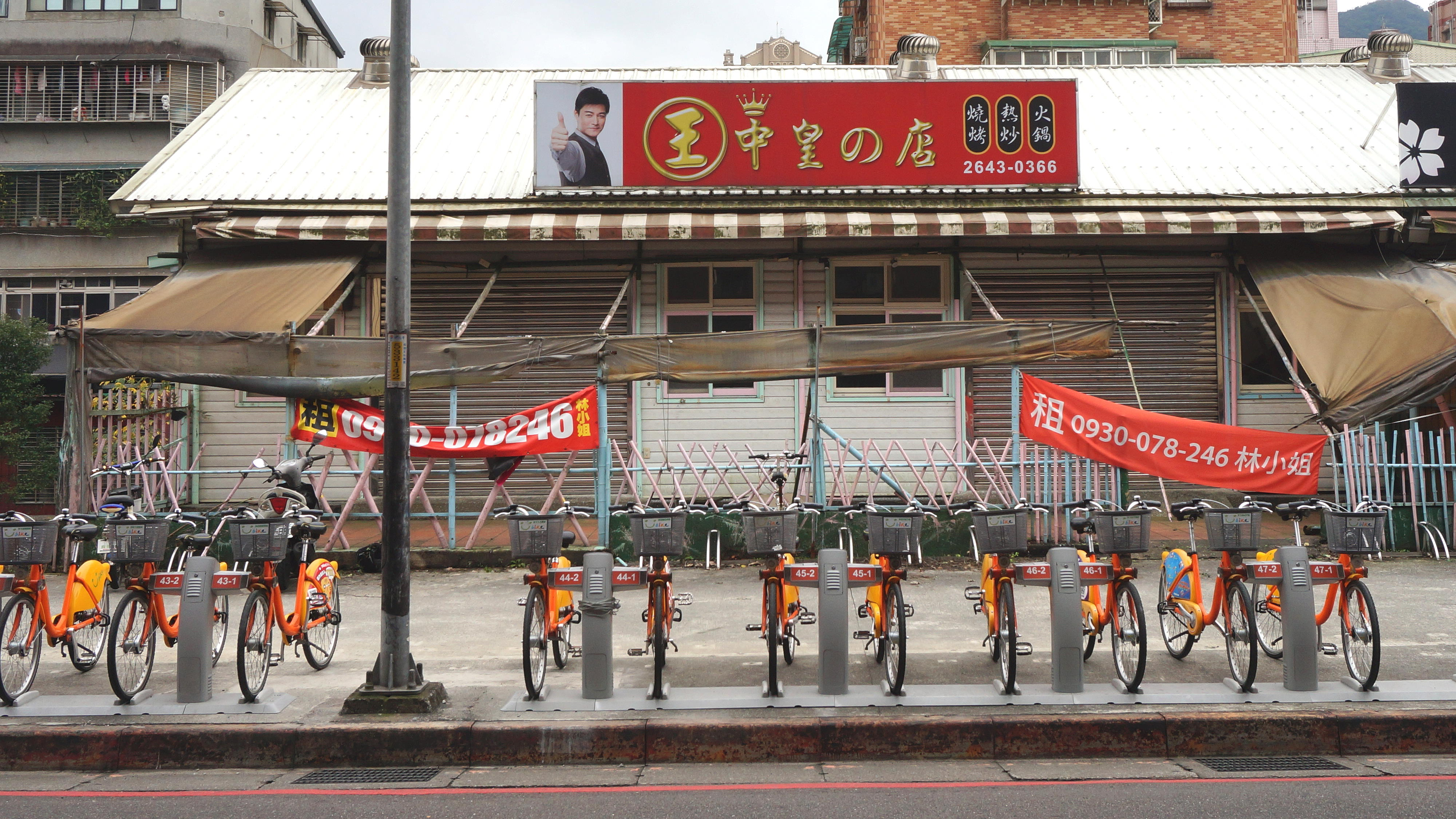 王中皇的店，位於新北市汐止區汐科路，無門牌，已歇業。